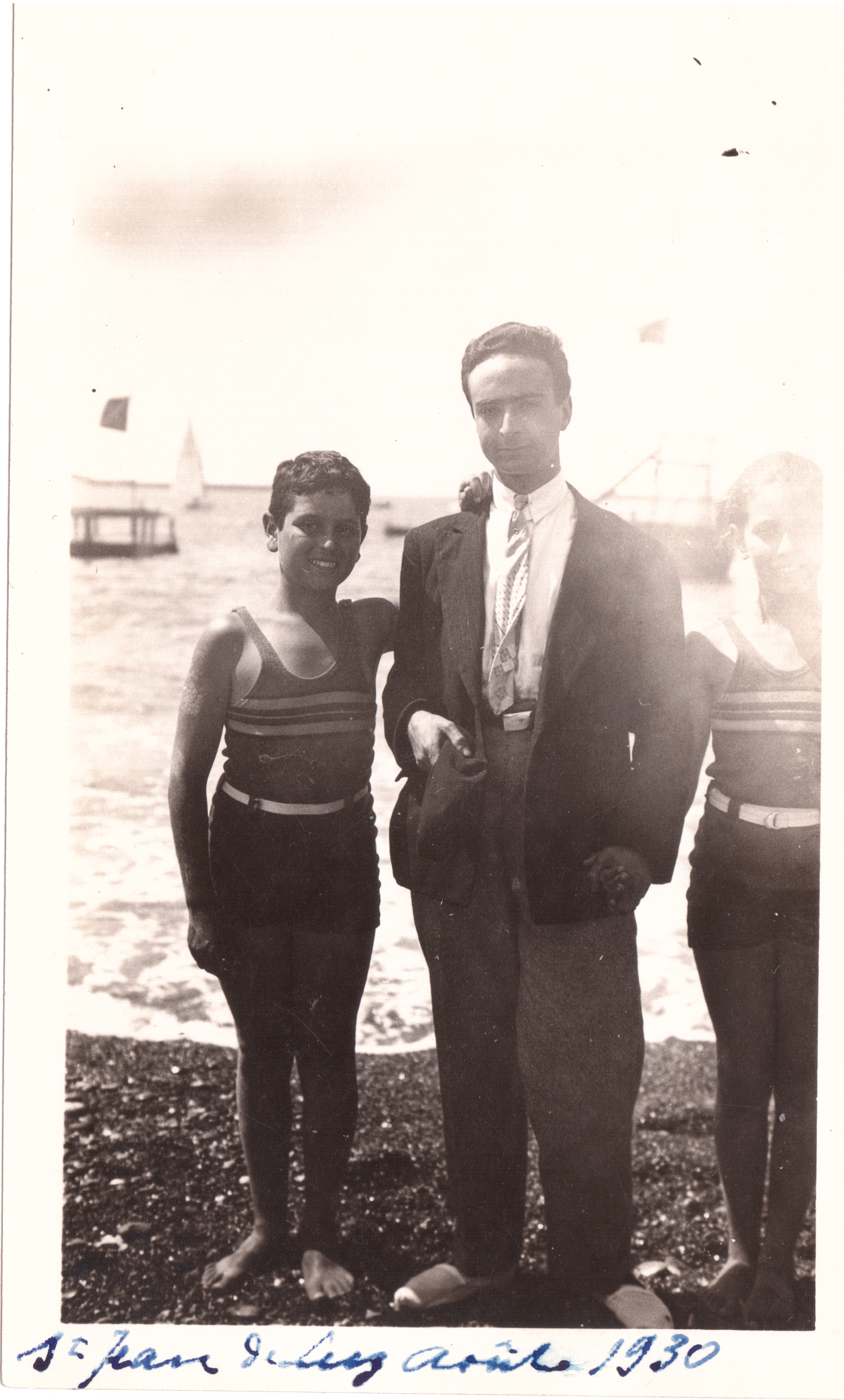 Roland Lévy (au centre), père présumé de François Truffaut, entouré de ses cousins Philippe et Irène sur la plage de Saint-Jean-de-Luz en août 1930.